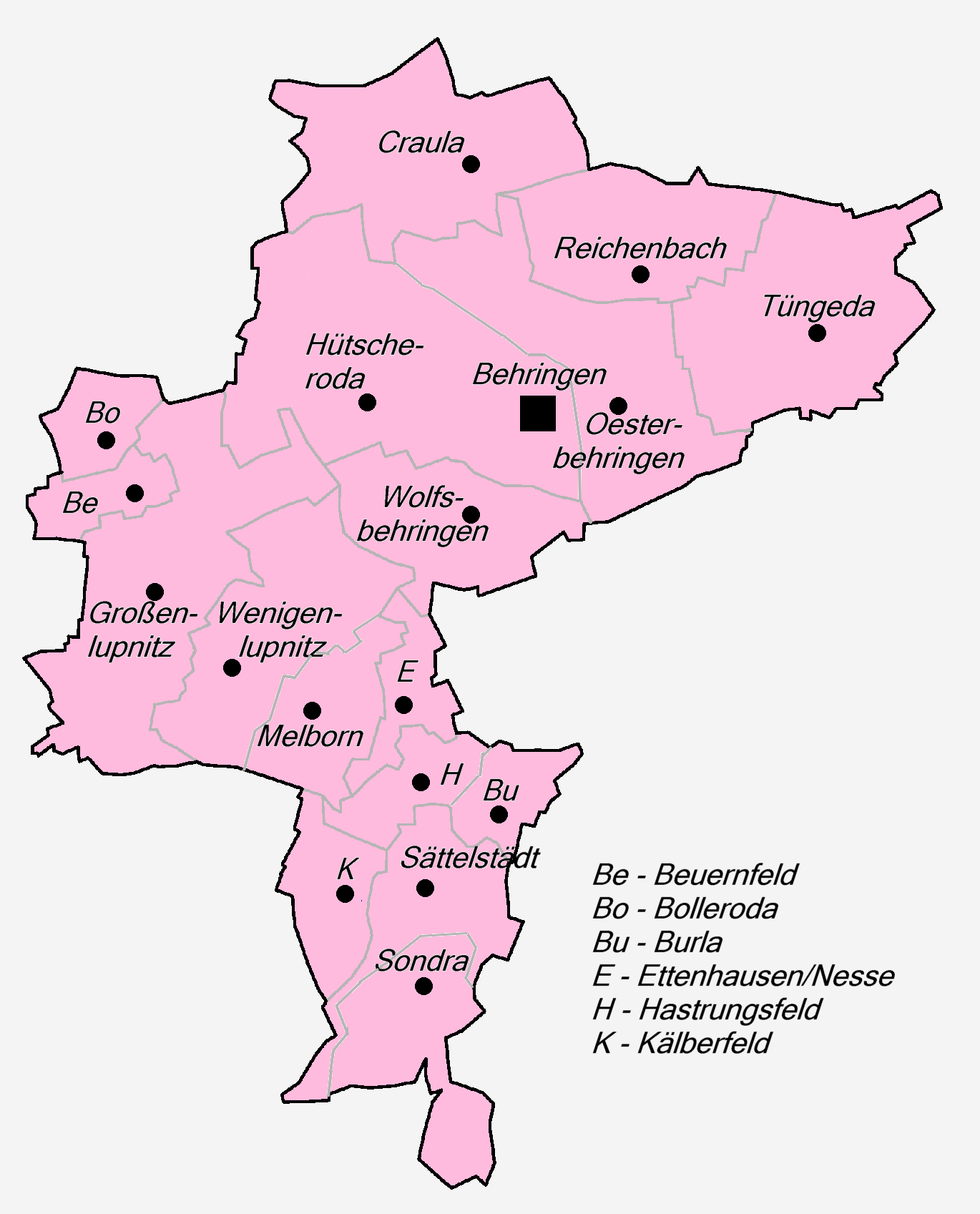 Kartensatz zur Gemeindeentwicklung